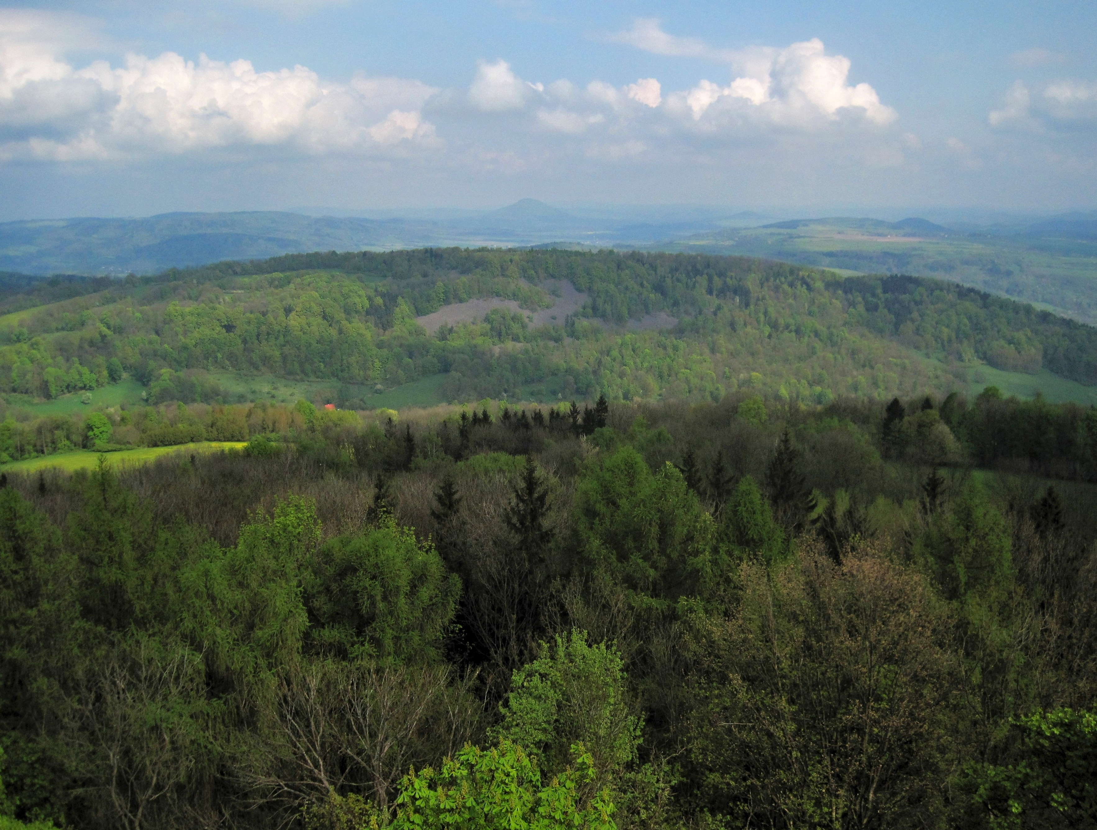 Kamenec (519 m) se suťovými poli v PR Kamenná hůra z rozhledny na Strážném vrchu u Merboltic